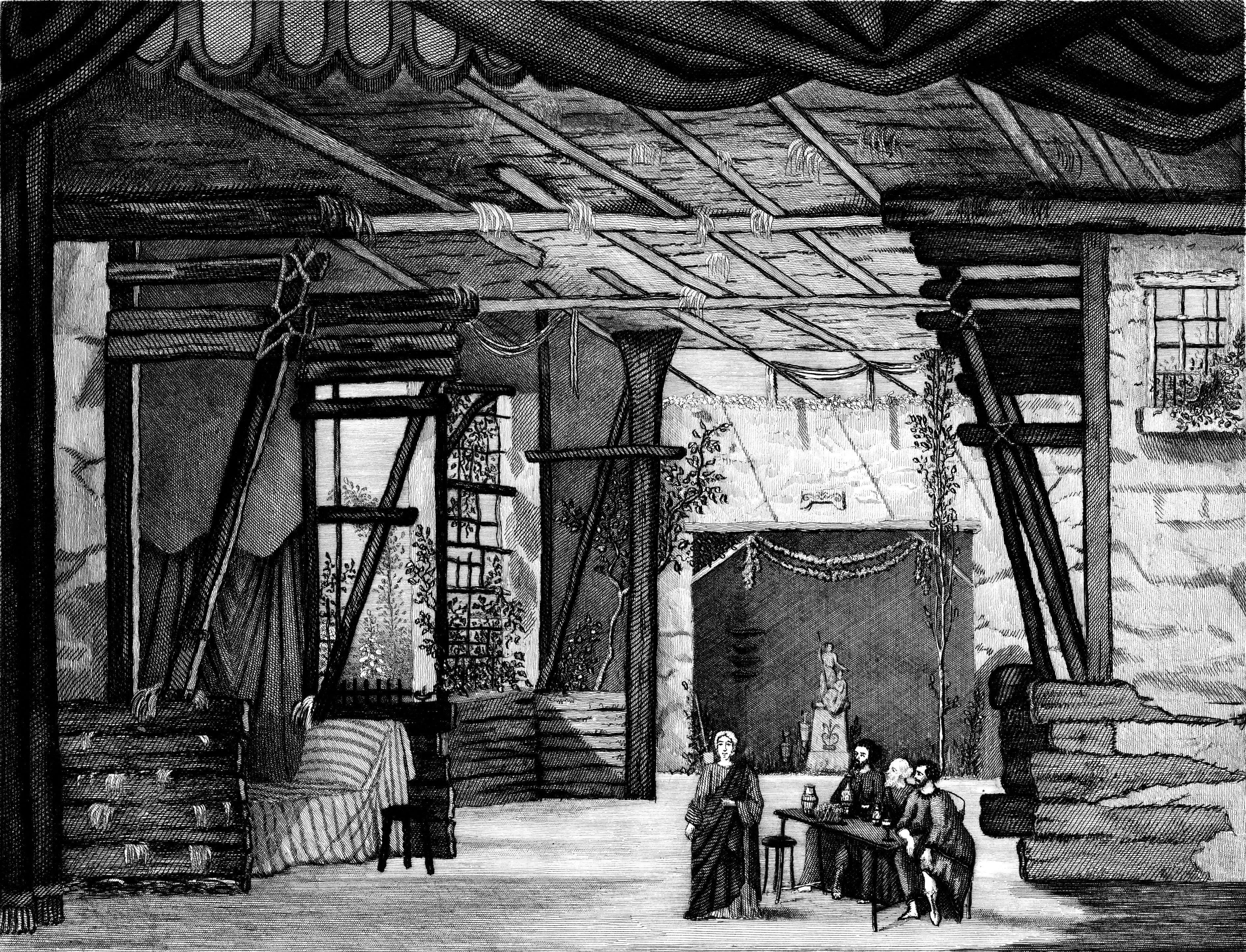 Gounod - Philémon et Baucis - Théatre-Lyrique, decoration of act 1, cabane de Philémon et Baucis, 1861 [estampe] / L. Jaugey ; d'après MM. Cambon et Thieri Auteur : Jaugey, L. (18..-18.. ; dessinateur). Dessinateur du modèle. Graveur Auteur : Cambon, Charles-Antoine (1802-1875). Peintre du modèle Auteur : Thierry, Joseph (1812-1866). Peintre du modèle Éditeur : [s.n.] (Paris)